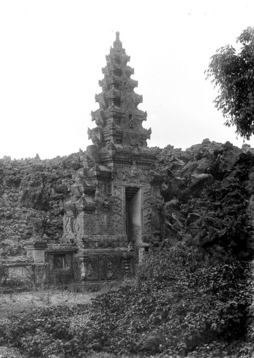 Negatief. De met lava bedolven poort van het tempelcomplex in Batoer